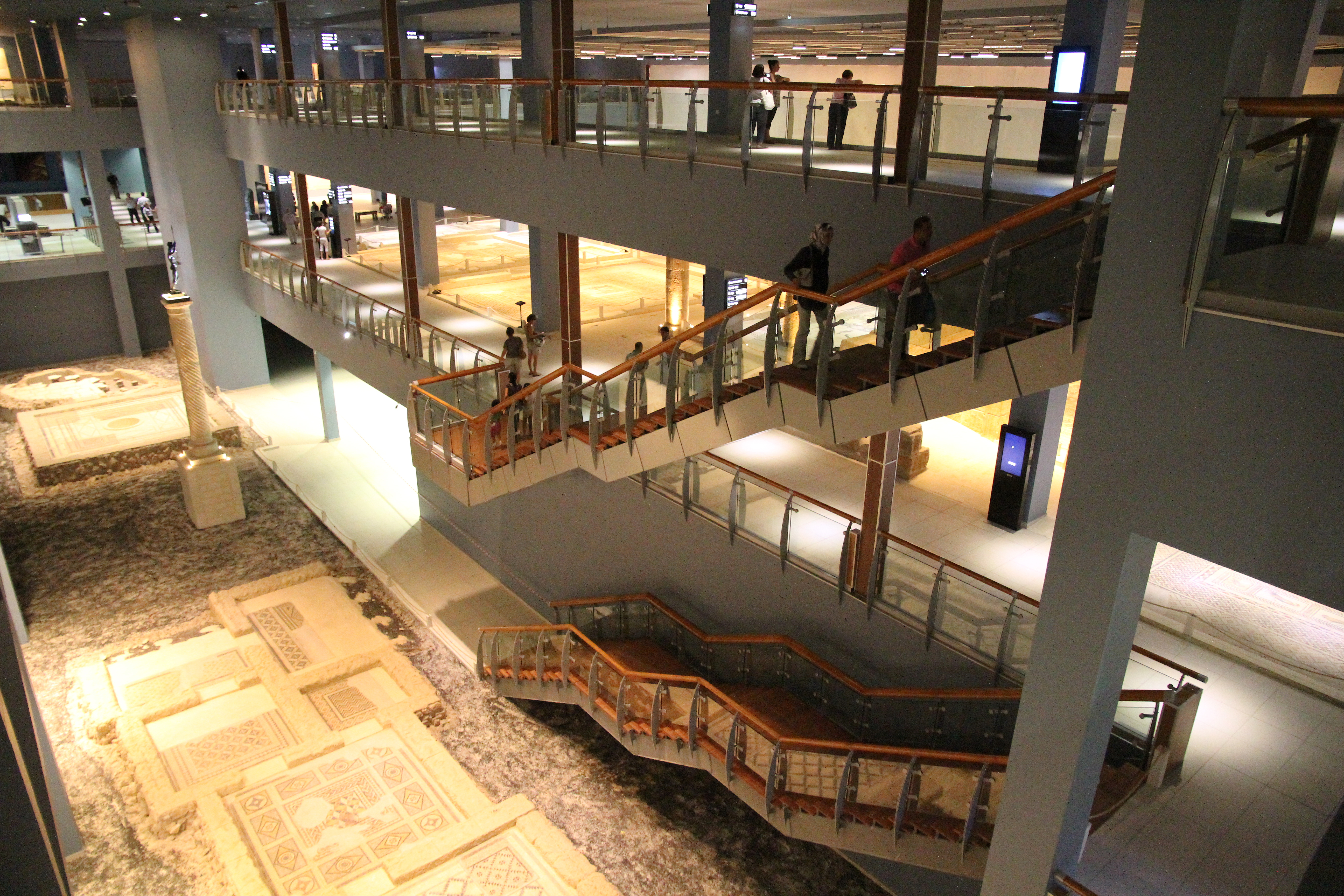 Zeugma-Mosaik-Museum, Gaziantep, Türkei